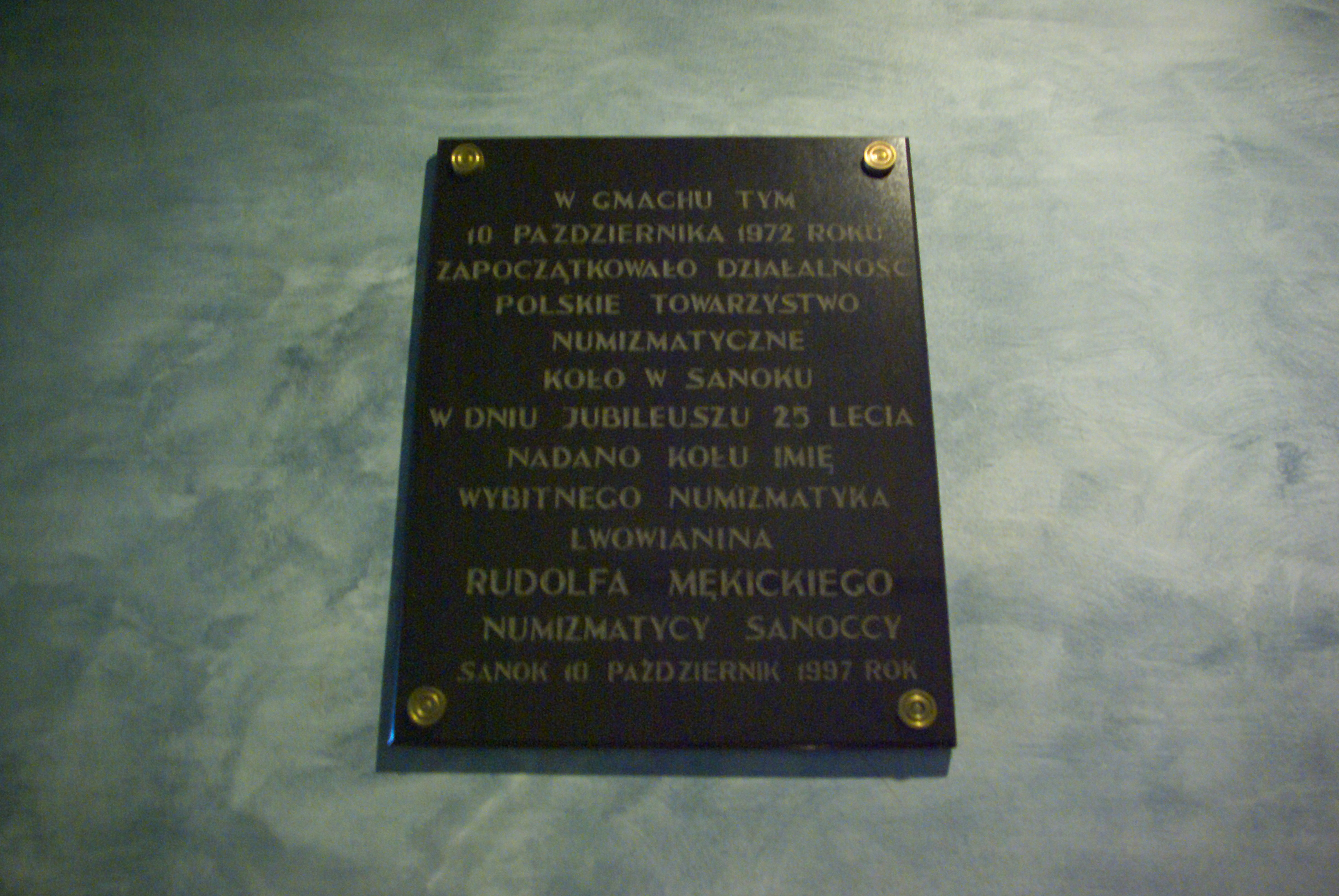 Sanocki Dom Kultury - tablica upamiętniająca powstanie w tym gmachu Polskiego Towarzystwa Numizmatycznego Koło w Sanoku w dniu 10 października 1972 roku